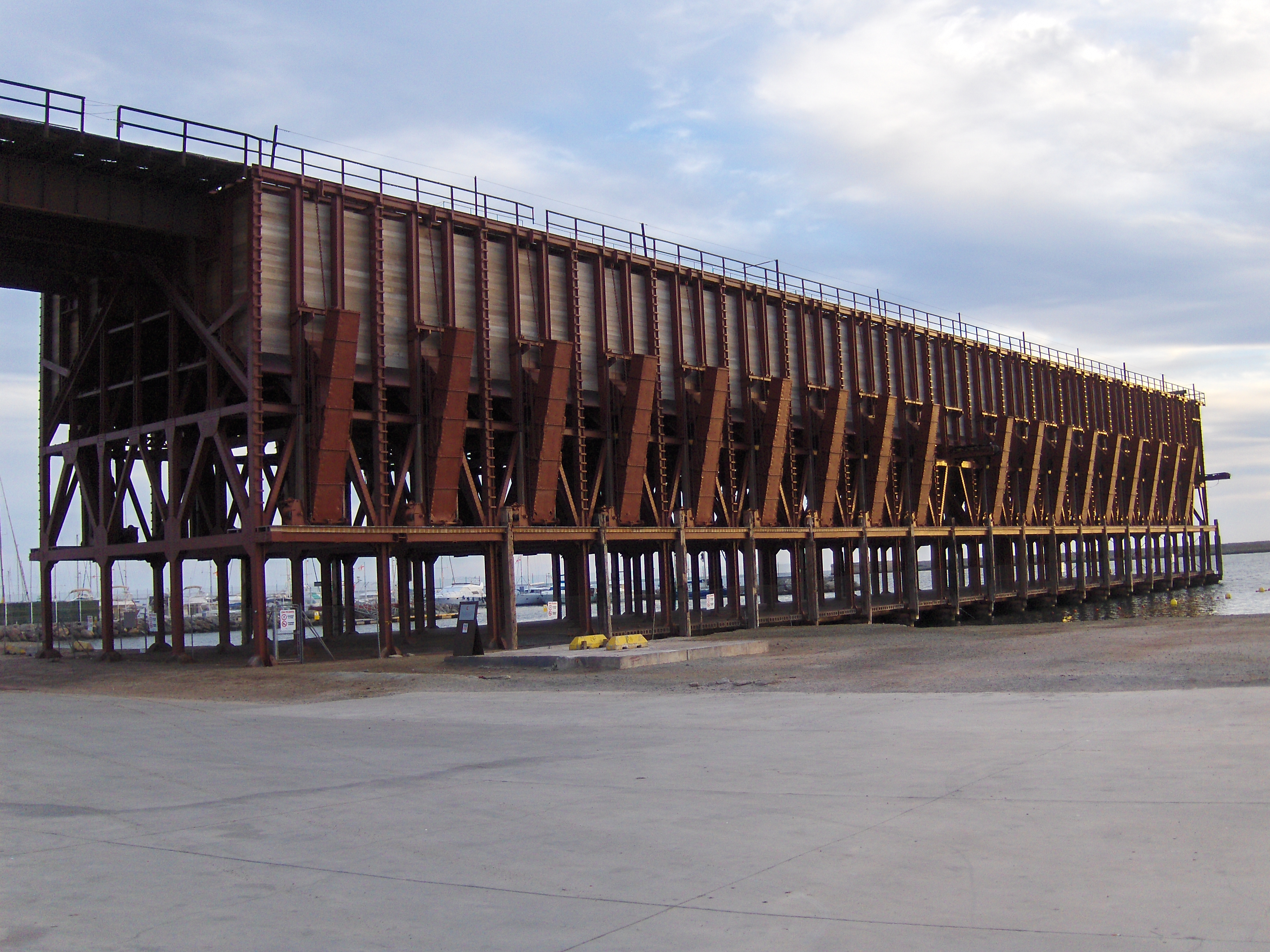 Cable Inglés restaurado a finales de 2012